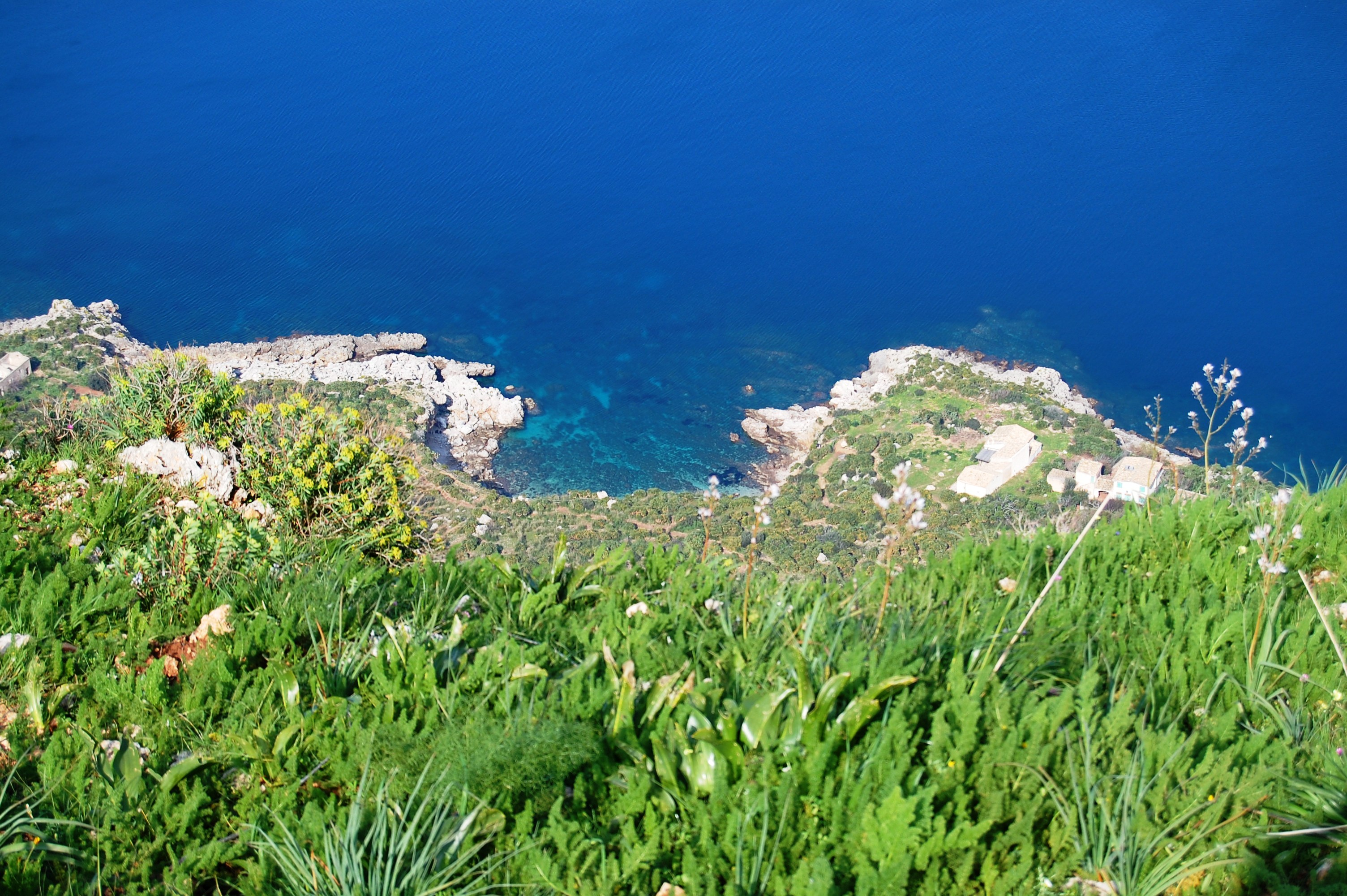 Zingaro Panorama dal sentiero di mezza costa